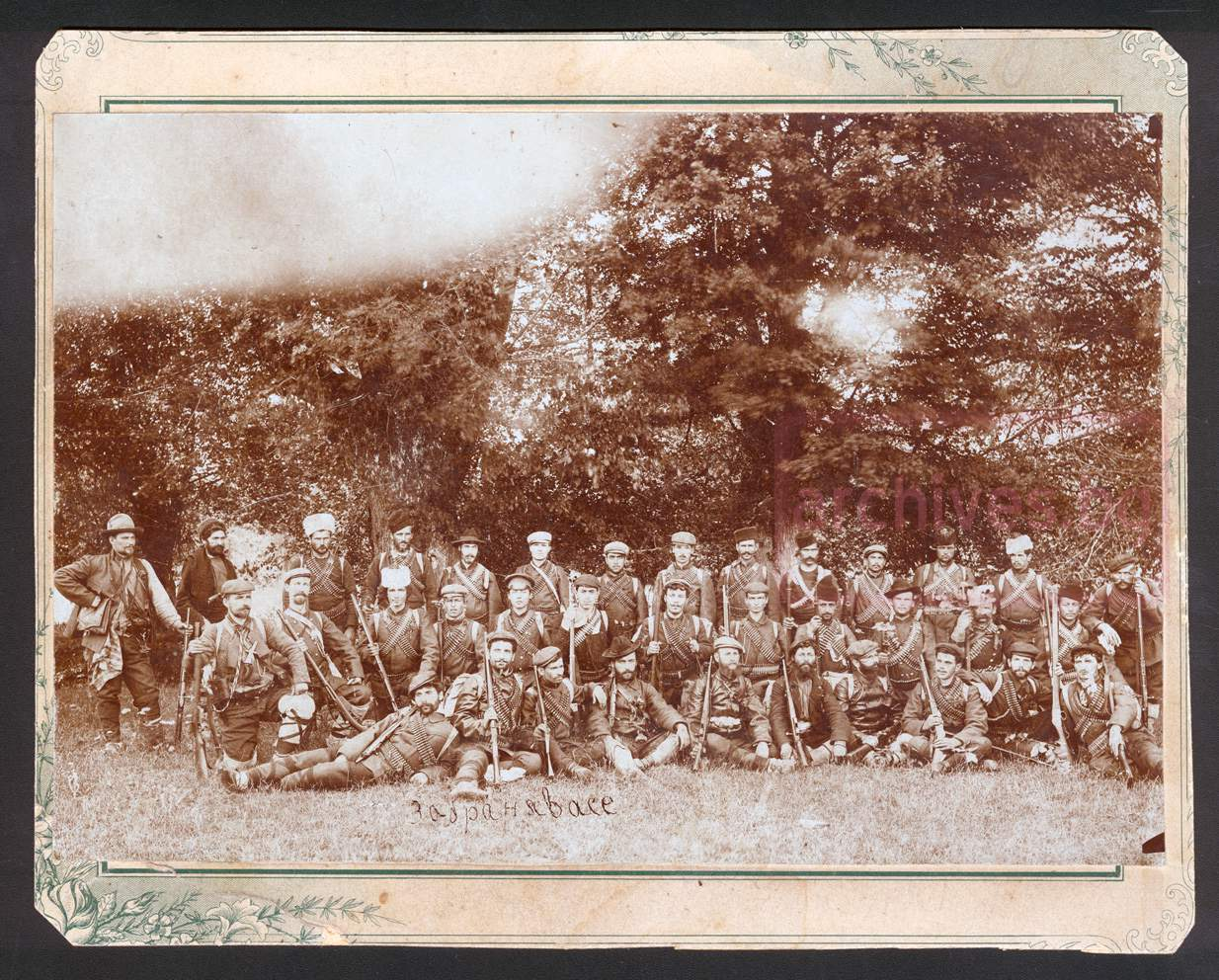 Български Четата на Кръстю Войвода Deutsch Die Tscheta von Krastju Wojwoda English Cheta of Krustio Voivoda